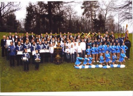 Groepsfoto KSW